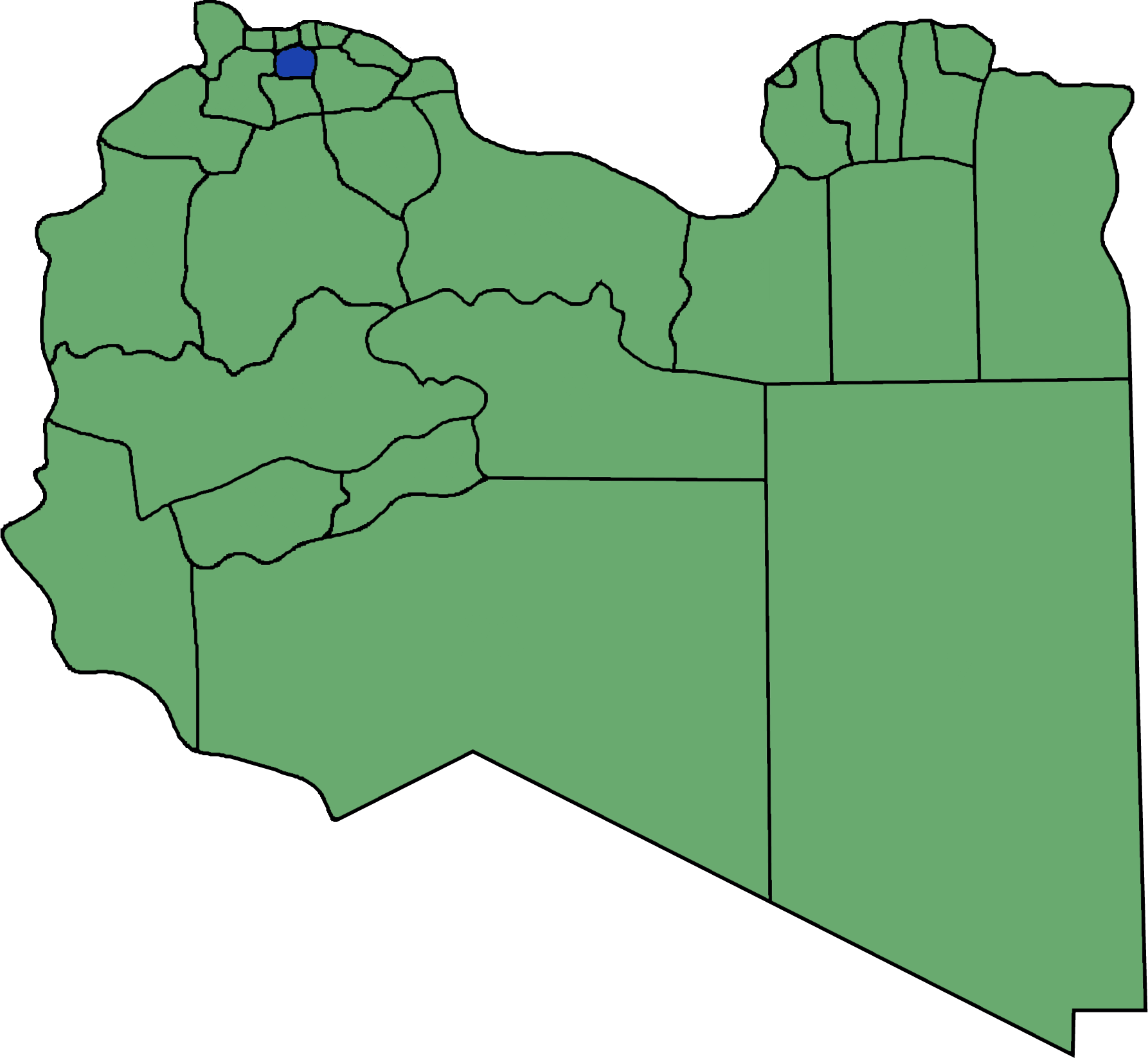 Die neuen Gemeinden (Munizipien) in Libyen. Al Jfara hervorgehoben.